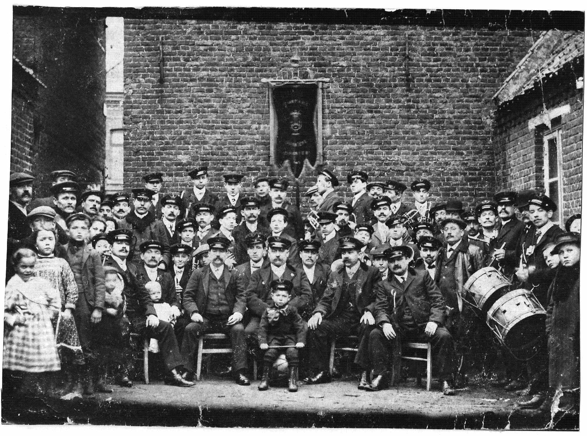 Fanfare ouvriere de Harnes 1903